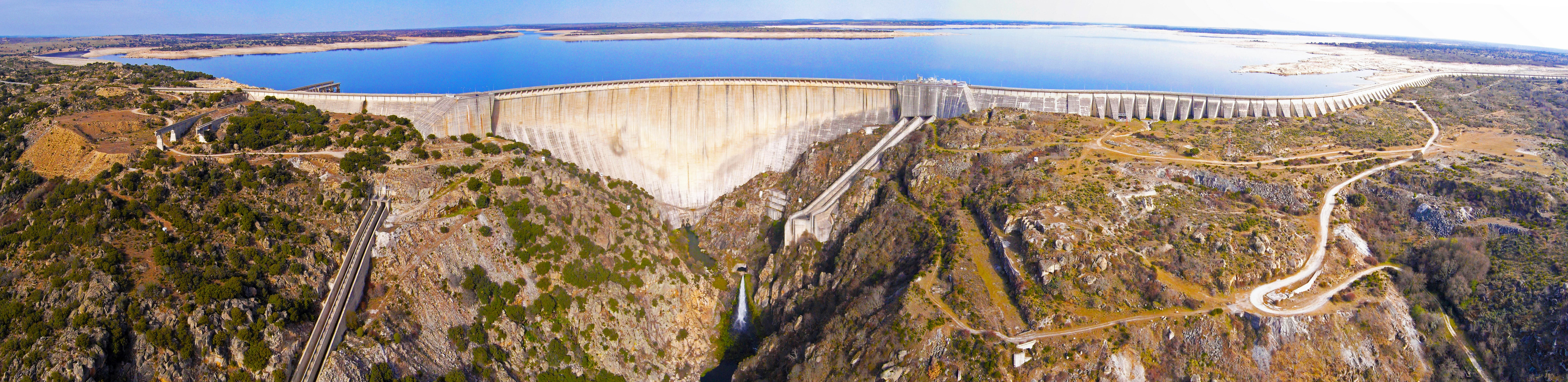 Toma panorámica mediante dron de la Presa de Almendra (Río Tormes, Salamanca, España).